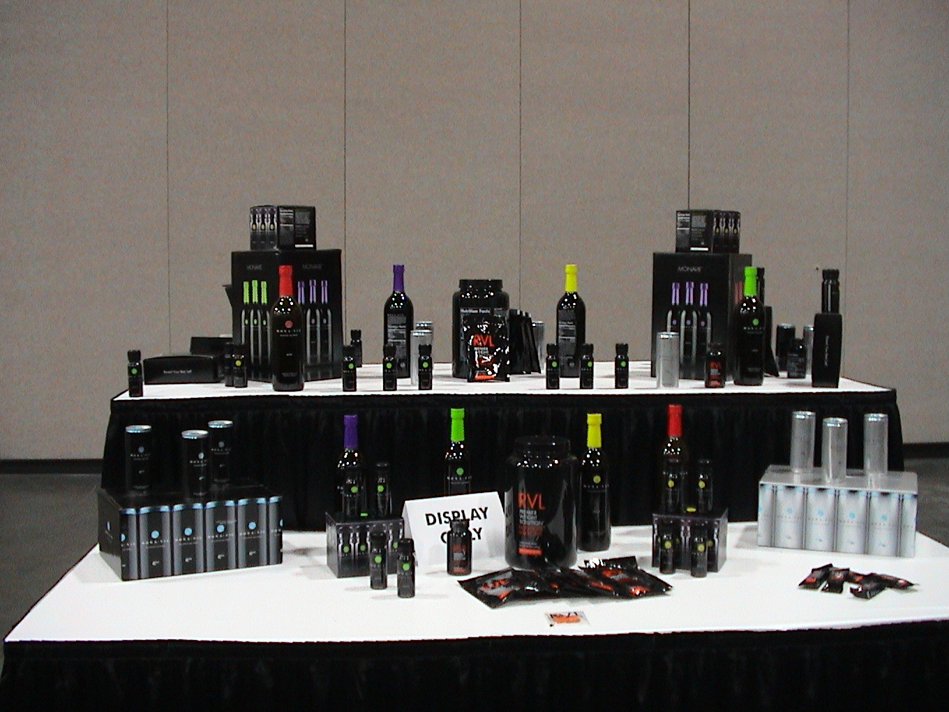 monavie products